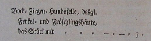 Preisedikt für Felle von 1801